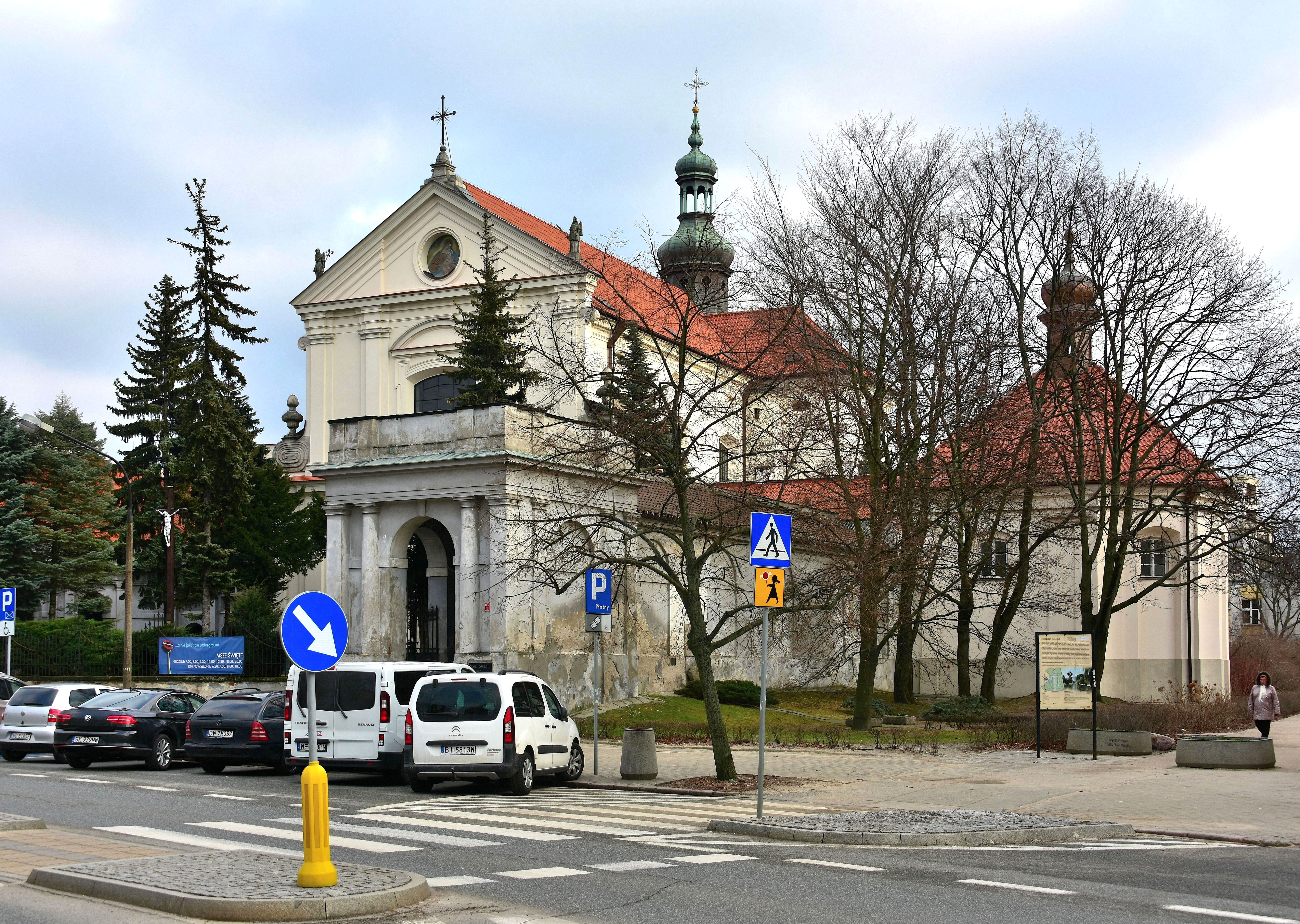 Kościół św. Antoniego z Padwy przy ul. Senatorskiej w Warszawie